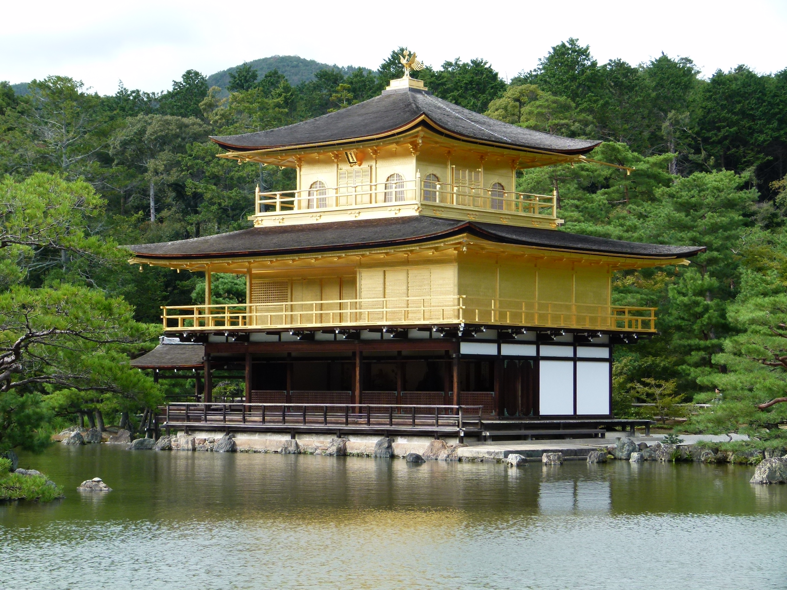 Goldener Tempel (Kinkaku-ji) in Kyoto